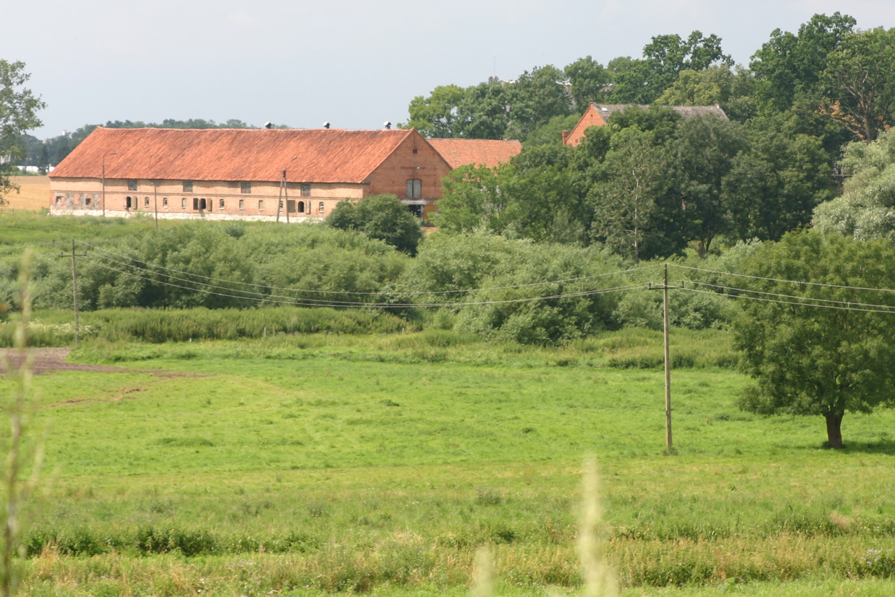 Wopławki, Polska, powiat kętrzyński.